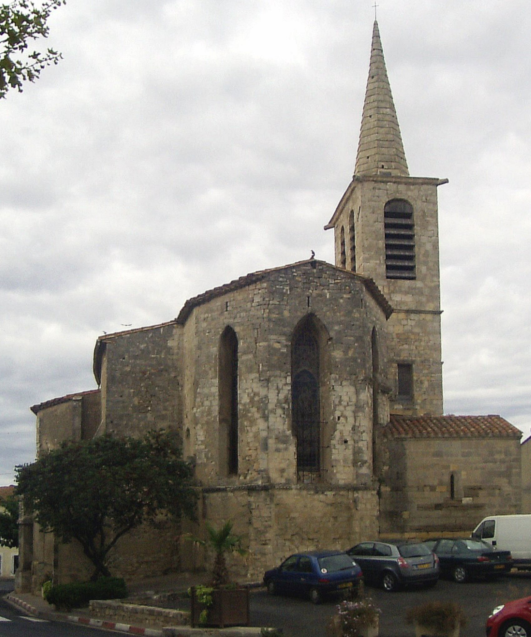 L'église Saint-Martin à Fleury